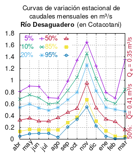 Curva de Variación Estacional del río Desaguadero en Cotacotani. Los diagramas se refieren al río Desaguadero de la Lagunas de Cotacotani. (No el río boliviano entre los lagos Titicaca y Poopo.) # cita publicación # | apellido = Dirección General de Aguas # | nombre = # | enlace-autor = Ministerio de Obras Públicas (Chile) # | título = Diagnóstico y clasificación de los cursos y cuerpos de agua según objetivos de calidad. Cuenca Río Lauca. # | ubicación = Santiago de Chile # | editorial = Ministerio de Obras Públicas (Chile) # | año = 2004 # | edición = # | url = # | urlarchivo = # | fechaarchivo = # | ref = harv # Tabla 4.1 (m3/s) pág. 30 mes 5% 10% 20% 50% 85% 95% abr 0.814 0.678 0.537 0.324 0.135 0.049 may 0.907 0.757 0.598 0.358 0.165 0.095 jun 0.898 0.707 0.529 0.304 0.154 0.103 jul 0.709 0.601 0.486 0.307 0.155 0.097 ago 0.699 0.625 0.536 0.365 0.155 0.031 sep 0.983 0.829 0.674 0.454 0.279 0.209 oct 1.345 1.050 0.800 0.525 0.377 0.336 nov 1.648 1.459 1.259 0.951 0.672 0.549 dic 1.244 1.030 0.820 0.530 0.310 0.226 ene 0.793 0.673 0.543 0.336 0.141 0.051 feb 0.697 0.609 0.503 0.300 0.050 0.010 mar 1.351 0.843 0.476 0.160 0.042 0.019 This plot was created with Gnuplot.